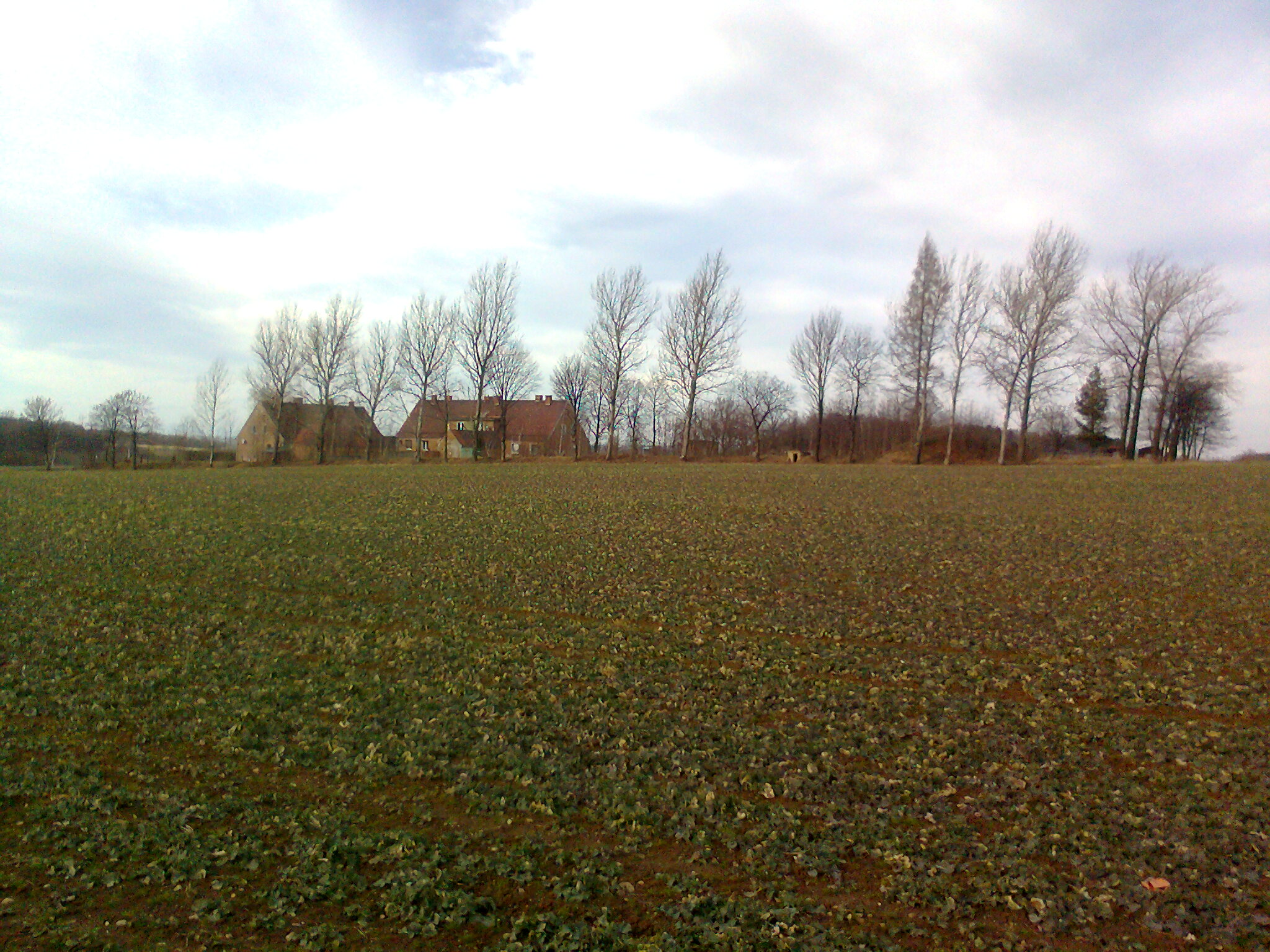 Gierałcice, była Strażnica Wojsk Ochrony Pogranicza (WOP) Gierałcice, następnie Strażnica Straży Granicznej (SG). Obecnie budynki mieszkalne